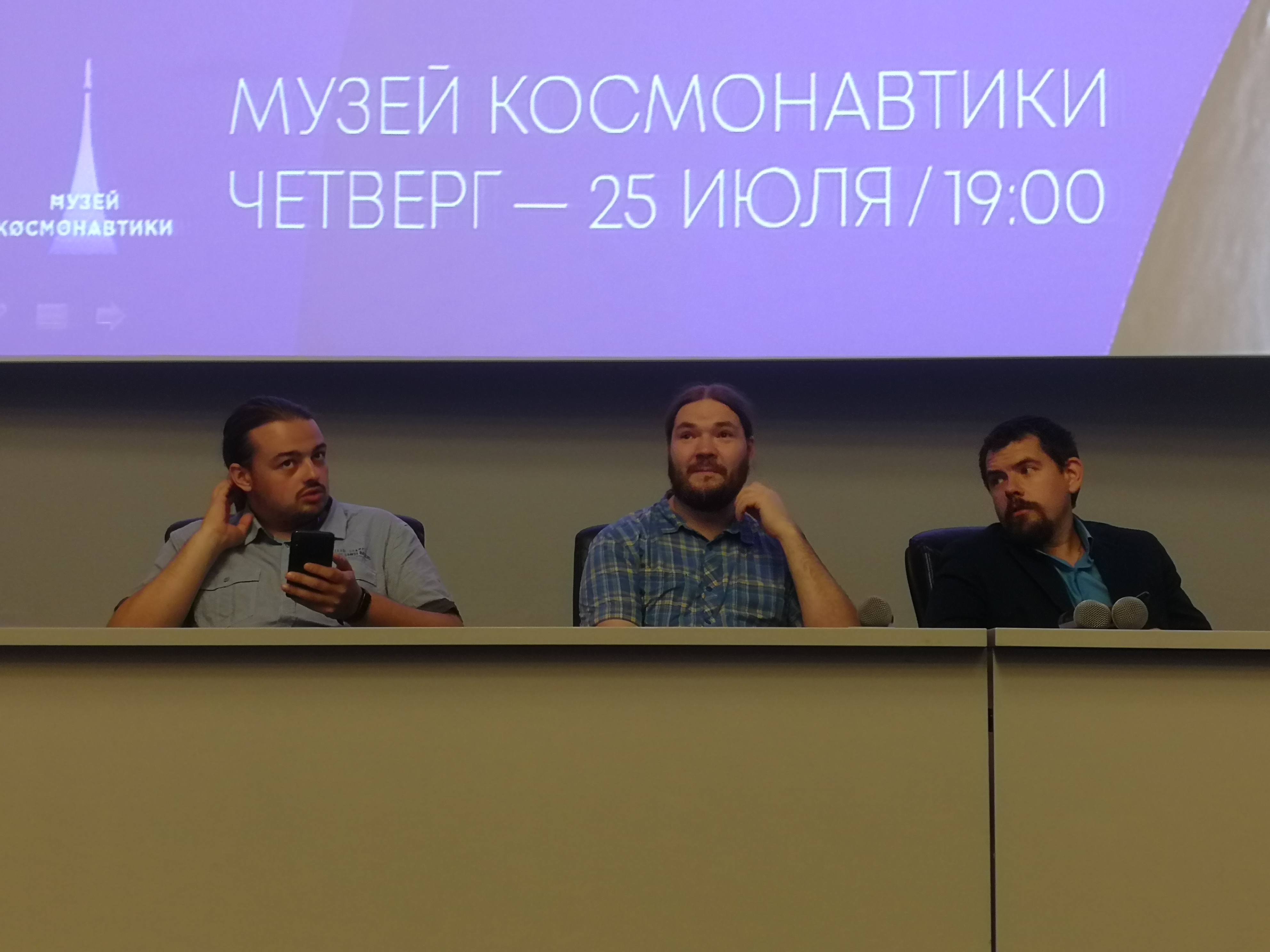 Презентация проекта лунного микроспутника 24 июля 2019 года